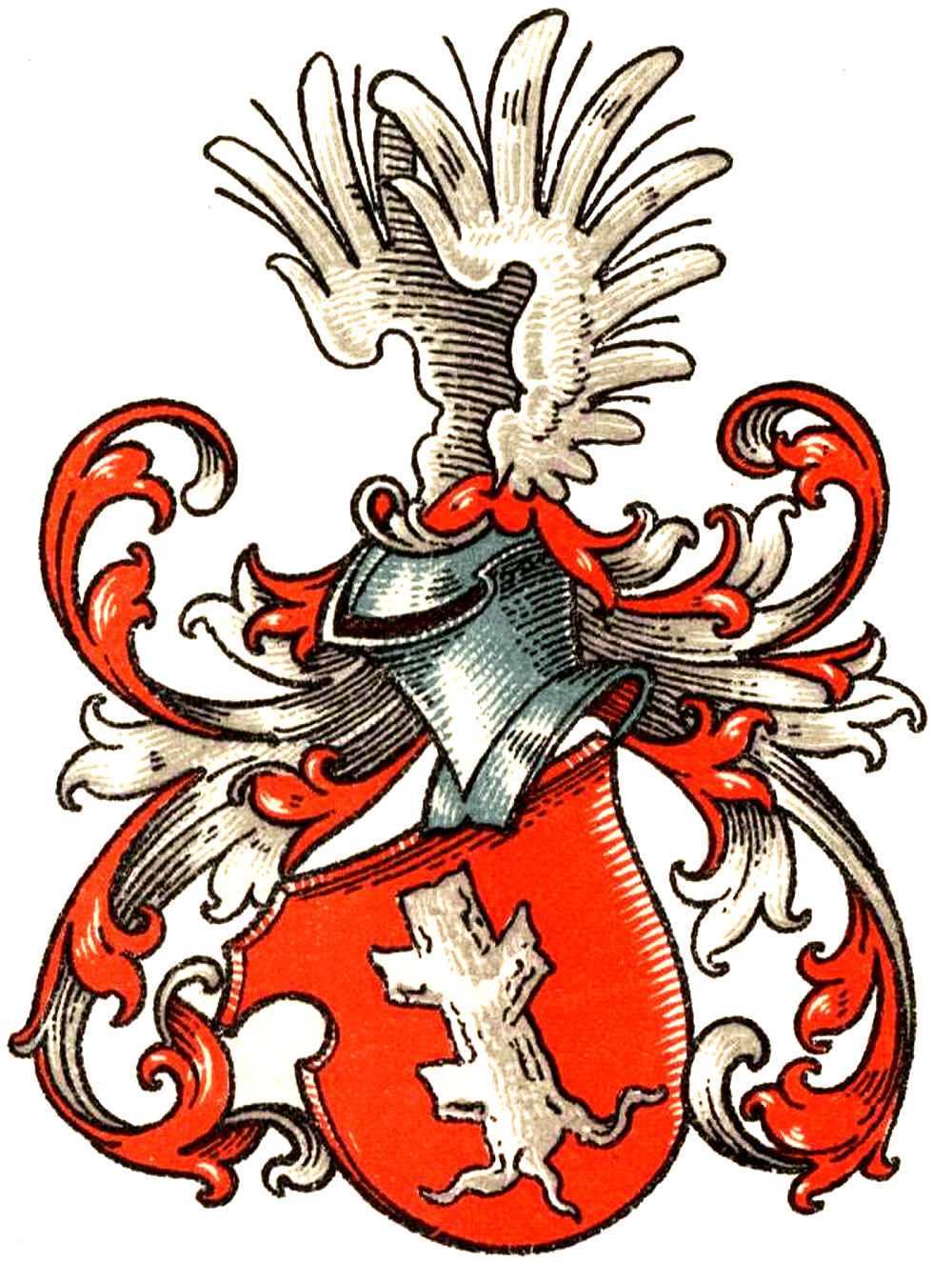 Wappen der von Haus mit dem Stammvater Reginwardus von Husen († 1147), aus Wennigsen, Niedersachsen, stammend. "Husen"/"Hus" im Sinne von "Sitz" bezeichnet hierbei eine Senke ein Kilometer südlich von Wennigsen, wo sich einst das "Gut Husen" befand (heute: "Hülser Bruch").